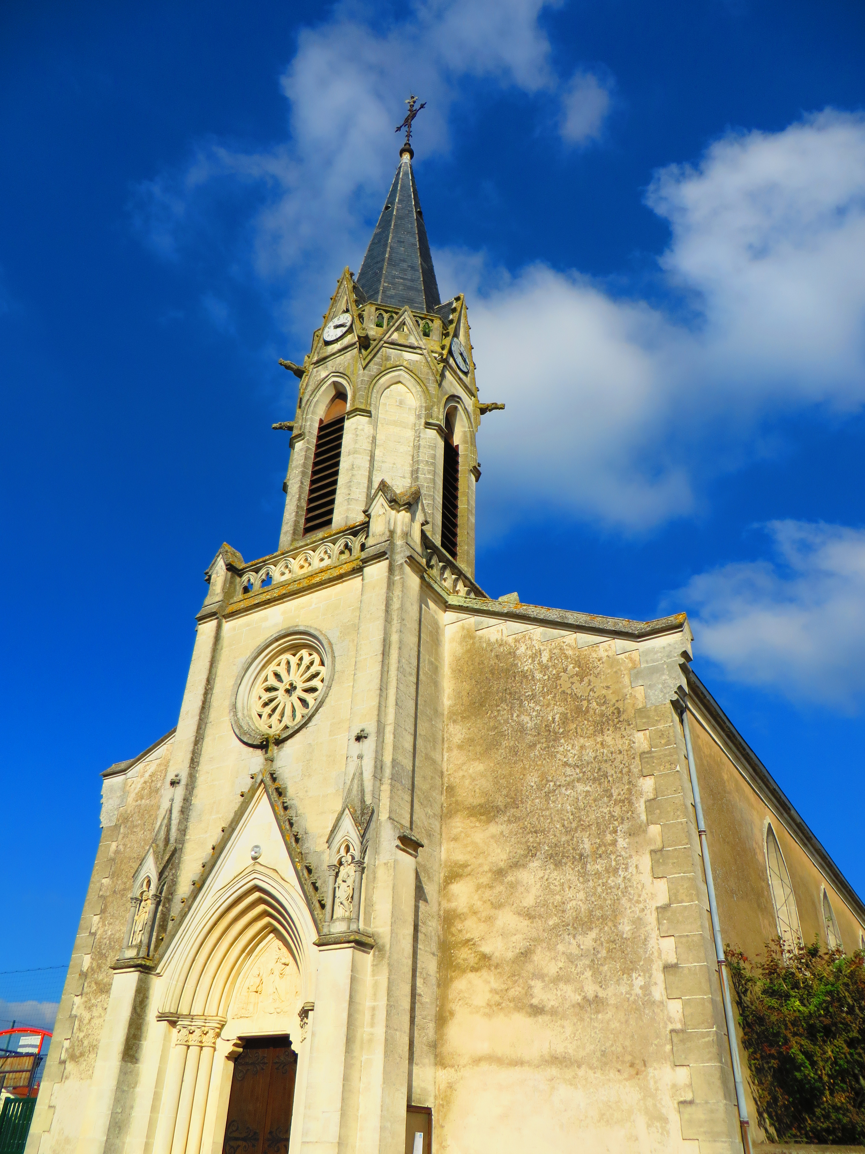 Bioncourt l'église Saint-Remi